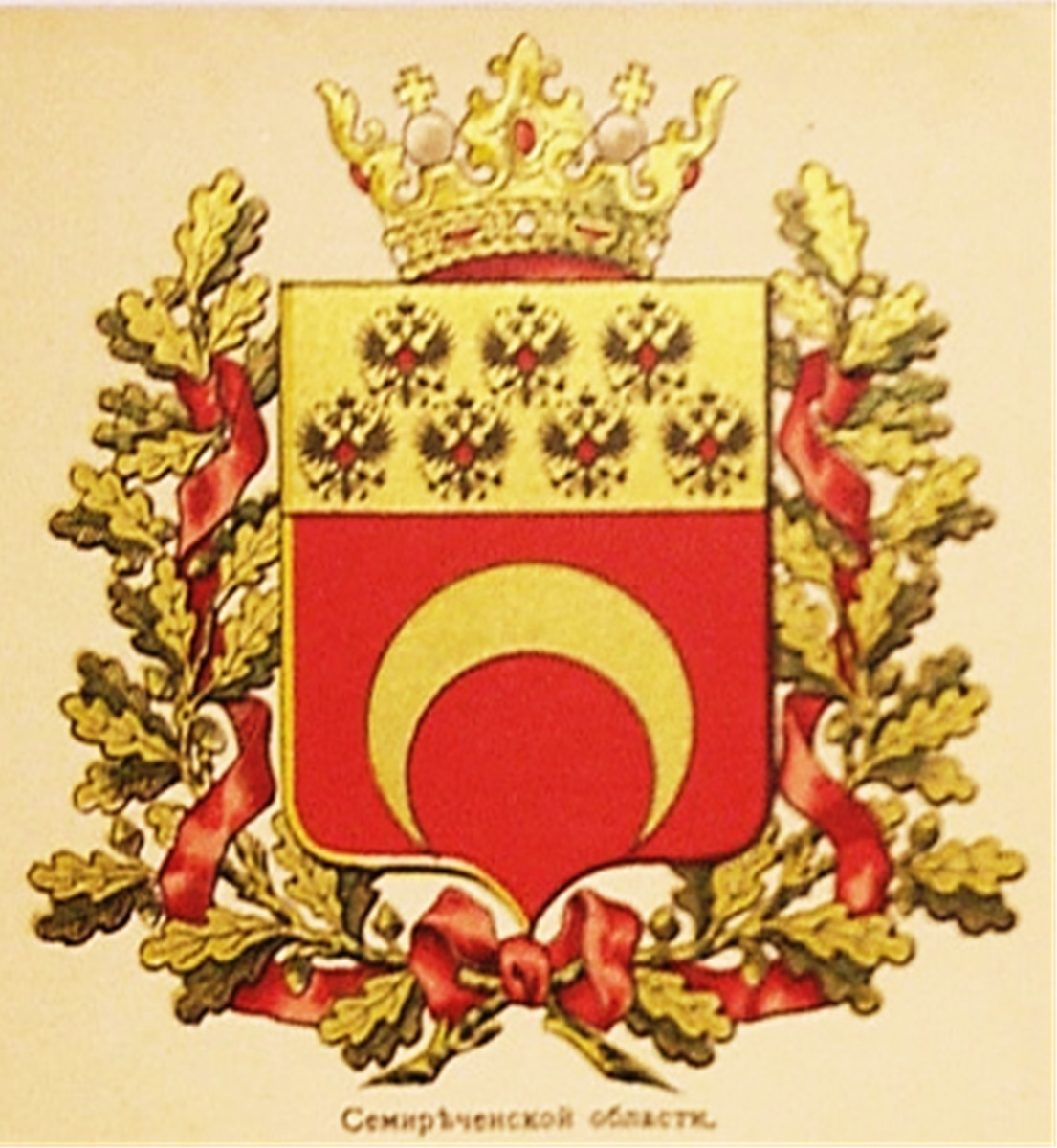 Russian Empire coat of arms Semirechensk Oblast. Paper non-post card of Russian Empire. Полугласный герб Российской Империи Семиреченской области издания Сукачова, СПб. Непочтовая карточка Российской Империи.